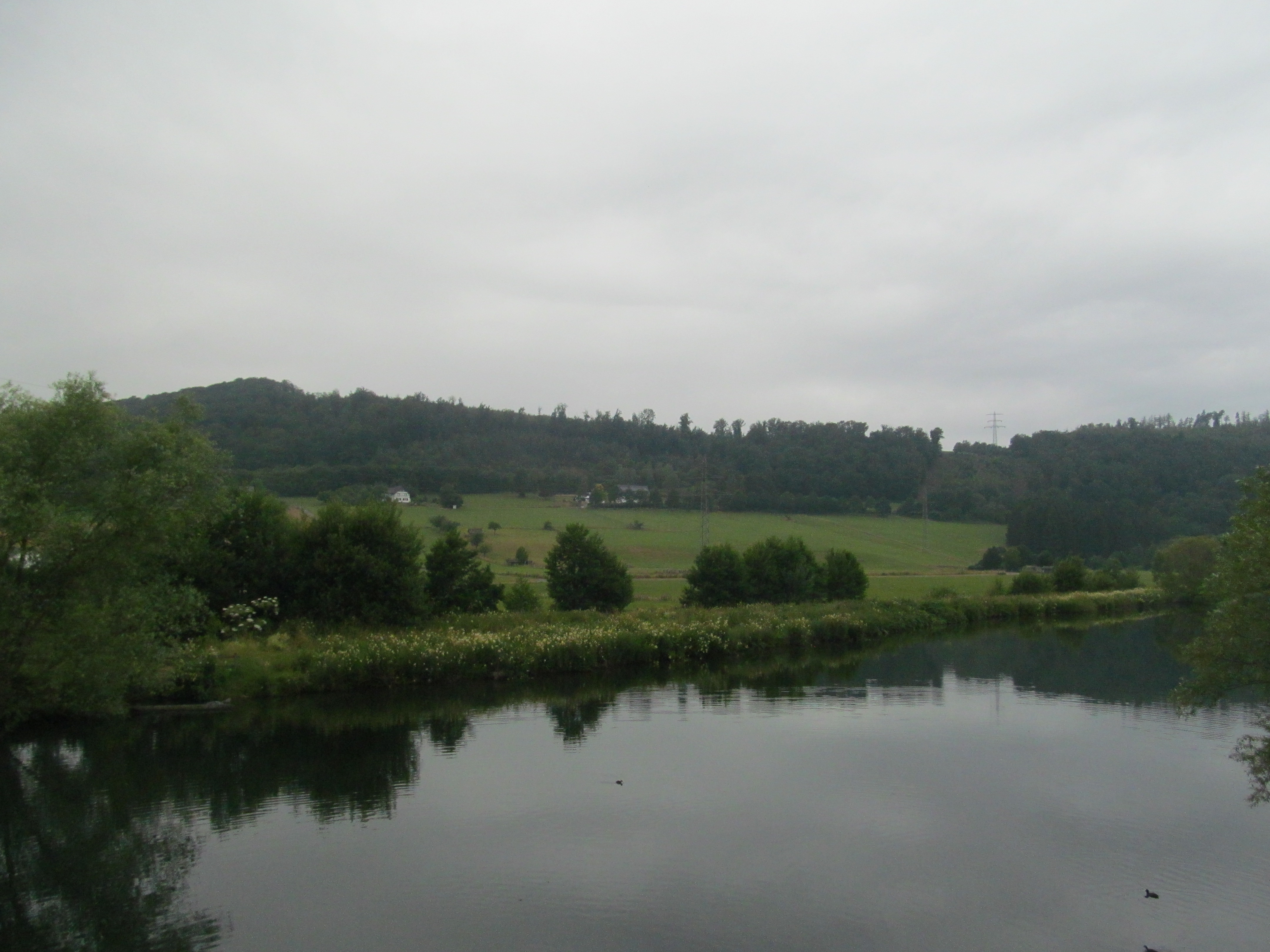 Blick von der Ruhrbrücke von Freienohl auf die Ruhr und das Landschaftsschutzgebiet Ruhrtal westlich Freienohl